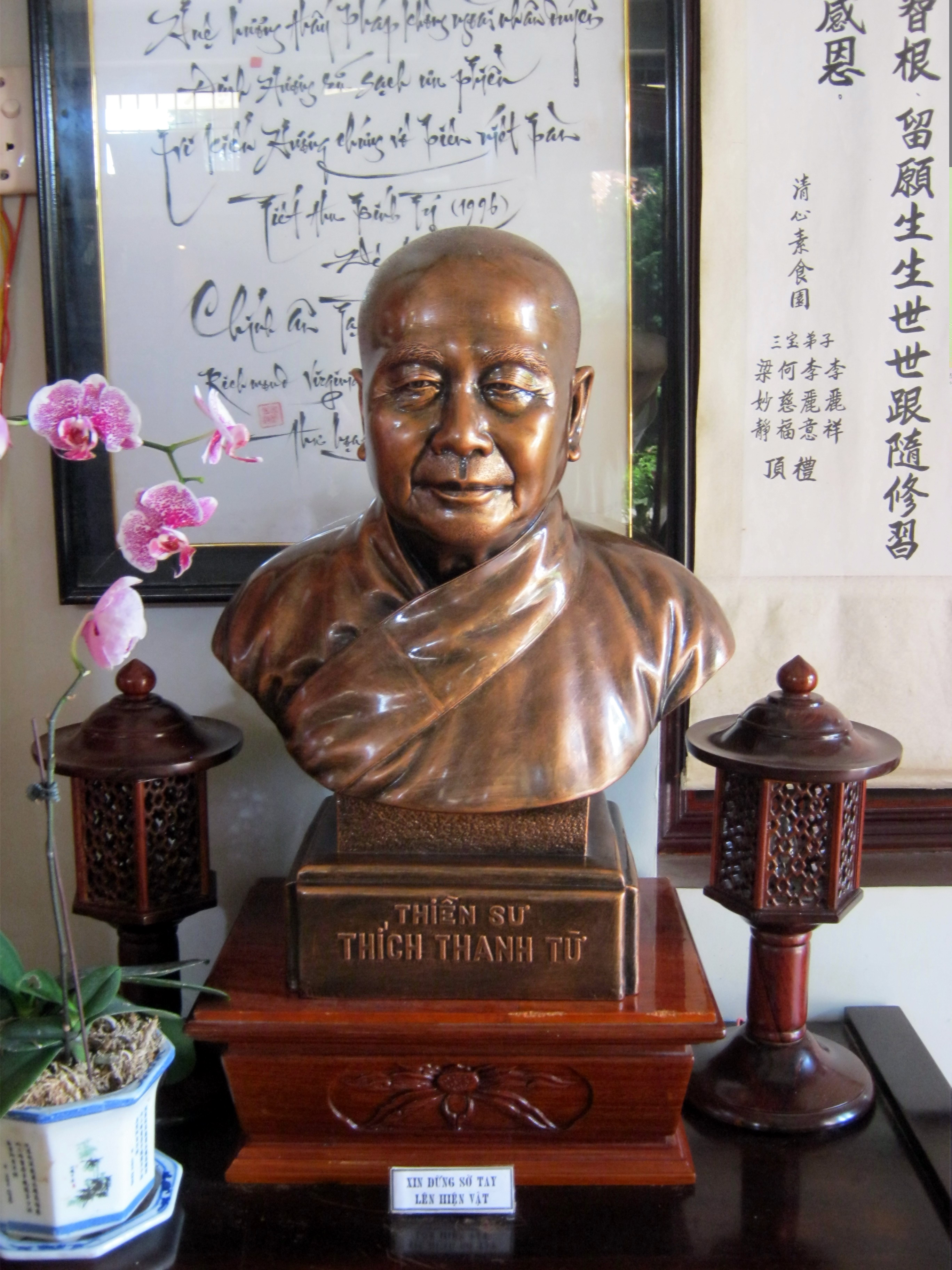 Tượng bán thân của Hòa thượng Thích Thanh Từ